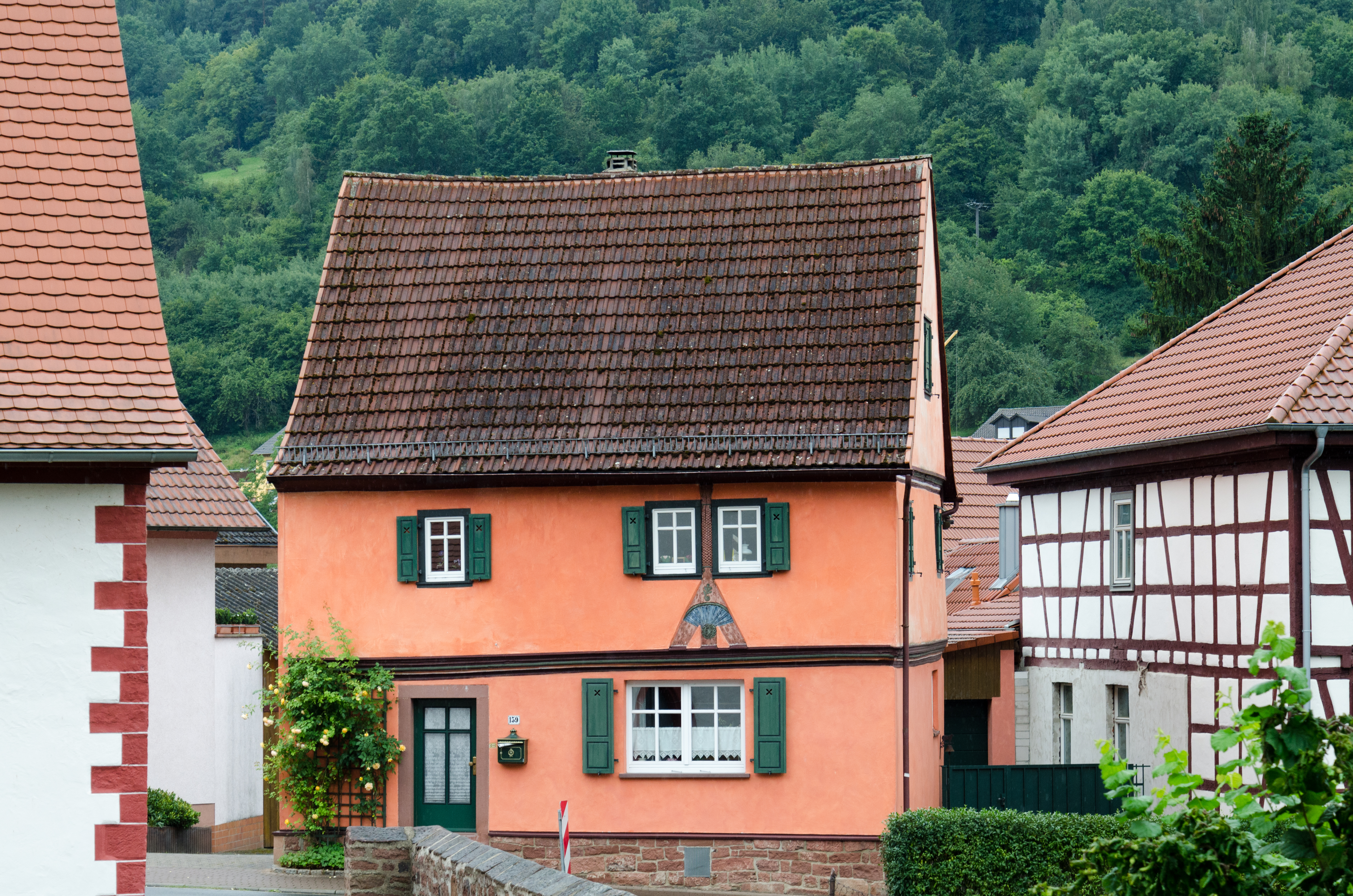 Eichenbühl, Hauptstraße 159